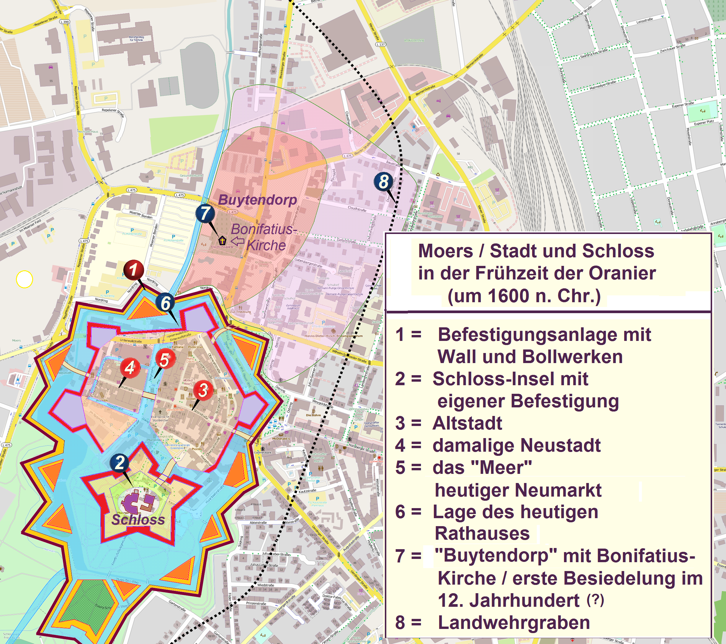 Festung Moers um 1600 - Skizze über die heutige Siedlungsstruktur gelegt (nach Boschheidgen 1917) This map of Festung Moers um 1600 - Skizze über die heutige Siedlungsstruktur gelegt (nach Boschheidgen 1917) was created from OpenStreetMap project data, collected by the community. This map may be incomplete, and may contain errors. Don't rely solely on it for navigation.